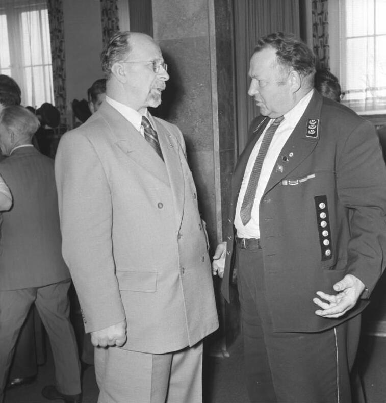 Zentralbild/Schmidt 24.4.1959 Autorenkonferenz des Mitteldeutschen Verlages in Bitterfeld Unter der Losung "Greif zur Feder Kumpel, die sozialistische Nationalkultur braucht dich" wurde am 24.4.1959 im Kulturpalast des EKB Bitterfeld eine Autorenkonferenz des Mitteldeutschen Verlages Halle eröffnet. An ihr nahmen fast 300 "schreibende Arbeiter" und etwas 150 Schriftsteller aus der DDR teil. Mit herzlichem Beifall begrüßten die Konferenzteilnehmer in ihrer Mitte den 1. Sekretär des ZK der SED, Walter Ulbricht. UBz.: Genosse Walter Ulbricht im Gespräch mit dem Nationalpreisträger und Held der Arbeit, Sepp Wenig von SDAG Wismut..